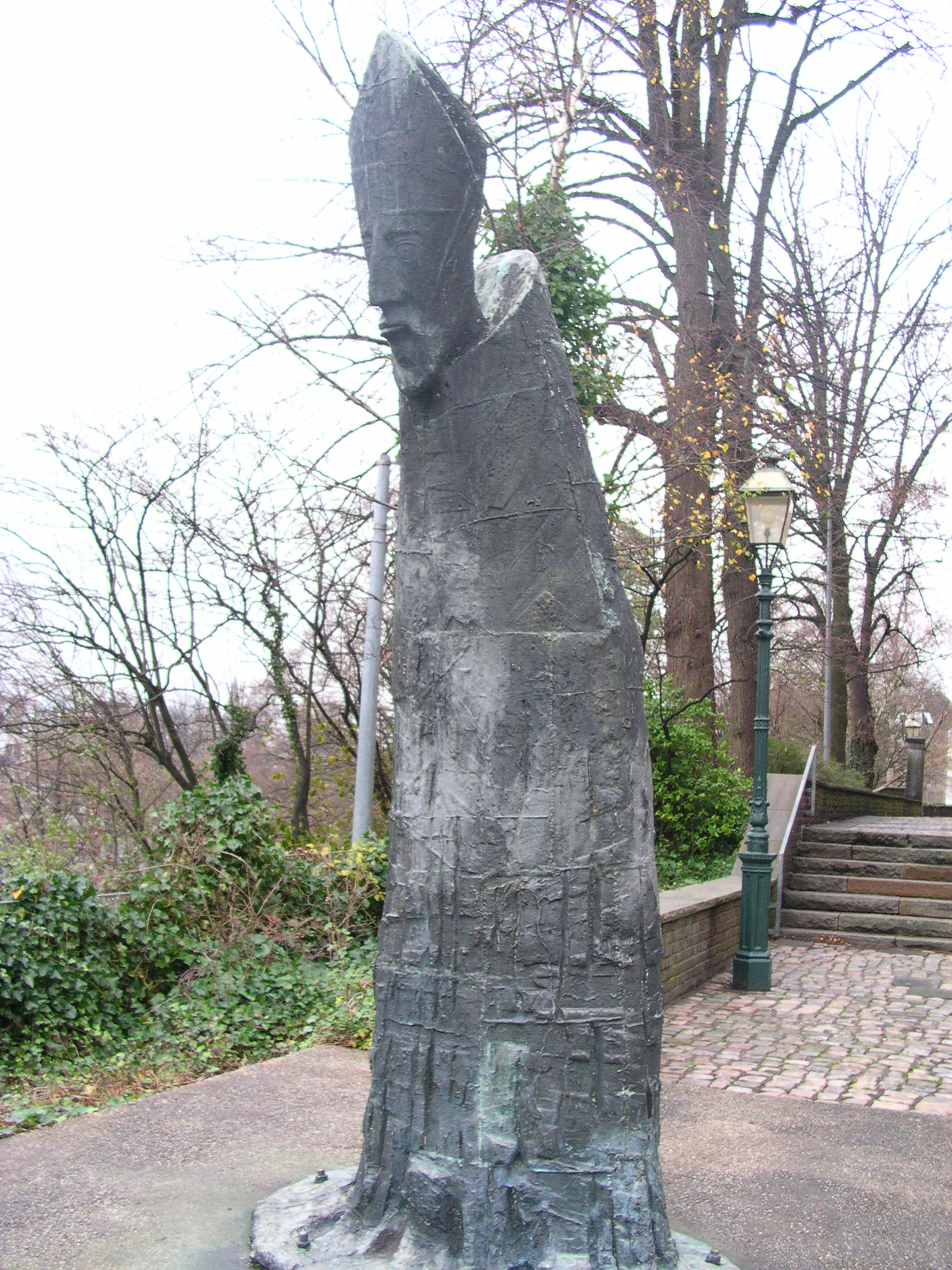 Statue für Gregor von Kalabrien an der rk. Pfarrkirche St. Johann Baptist in Aachen Burtscheid